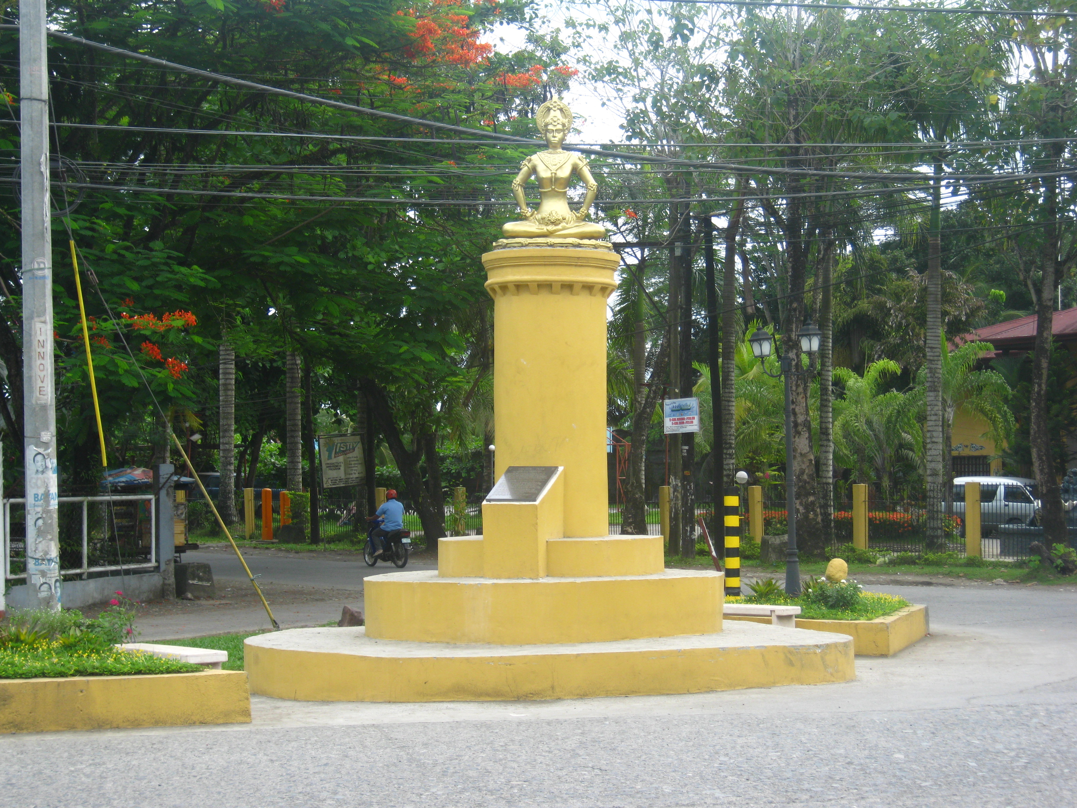 Golden Tara